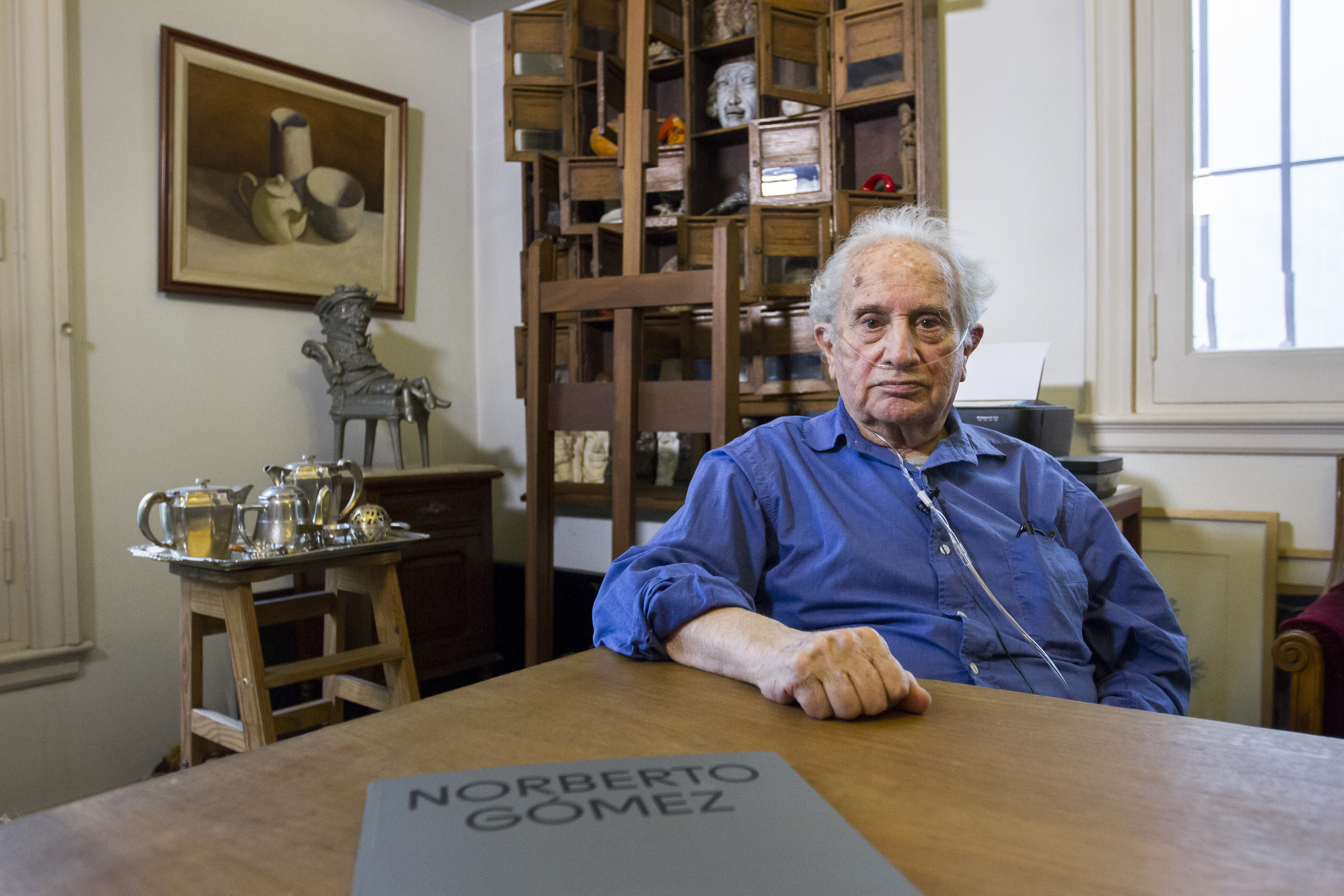 Buenos Aires, 11 de diciembre de 2018 - Historias de Cultura - Norberto Gómez.